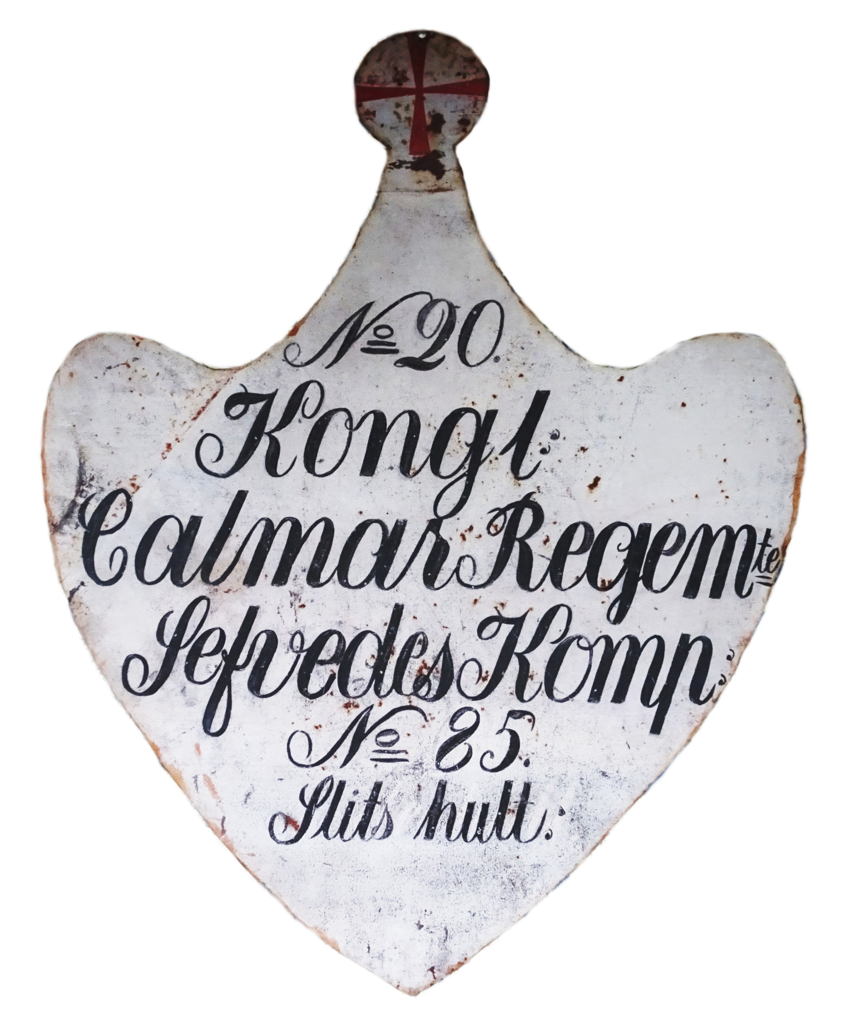 Rotetavla för soldattorpet Söderhult No 85 Slitshult